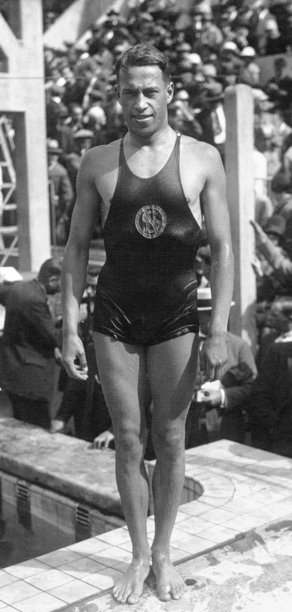 Tourelles, championnats de France de natation : Zeibig (portrait), gagnant du 100 mètres dos : [photographie de presse] / Agence Meurisse